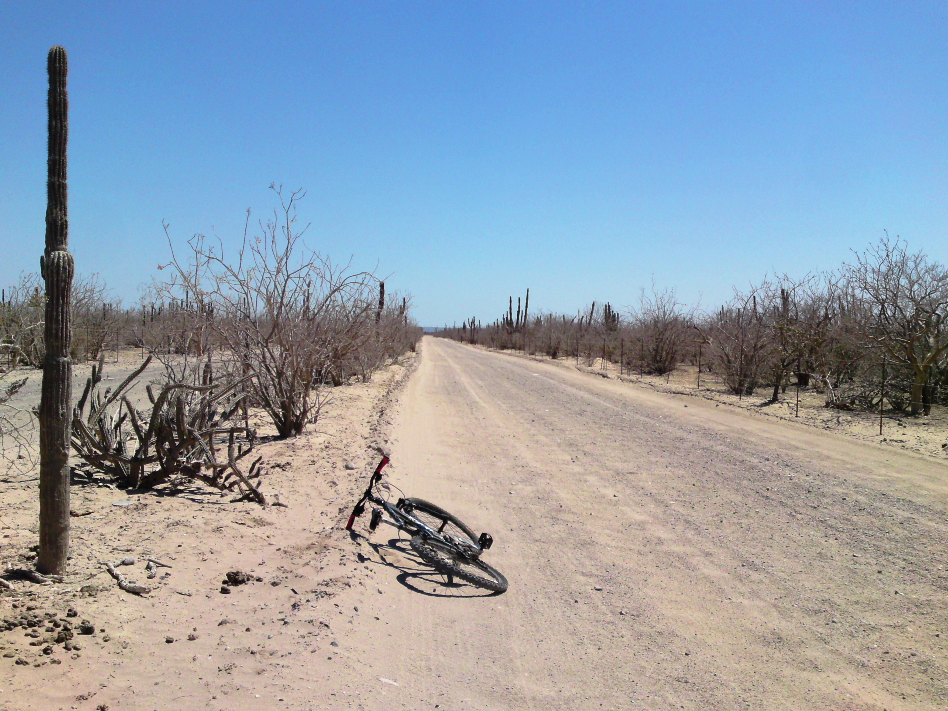 Desde el Mogote